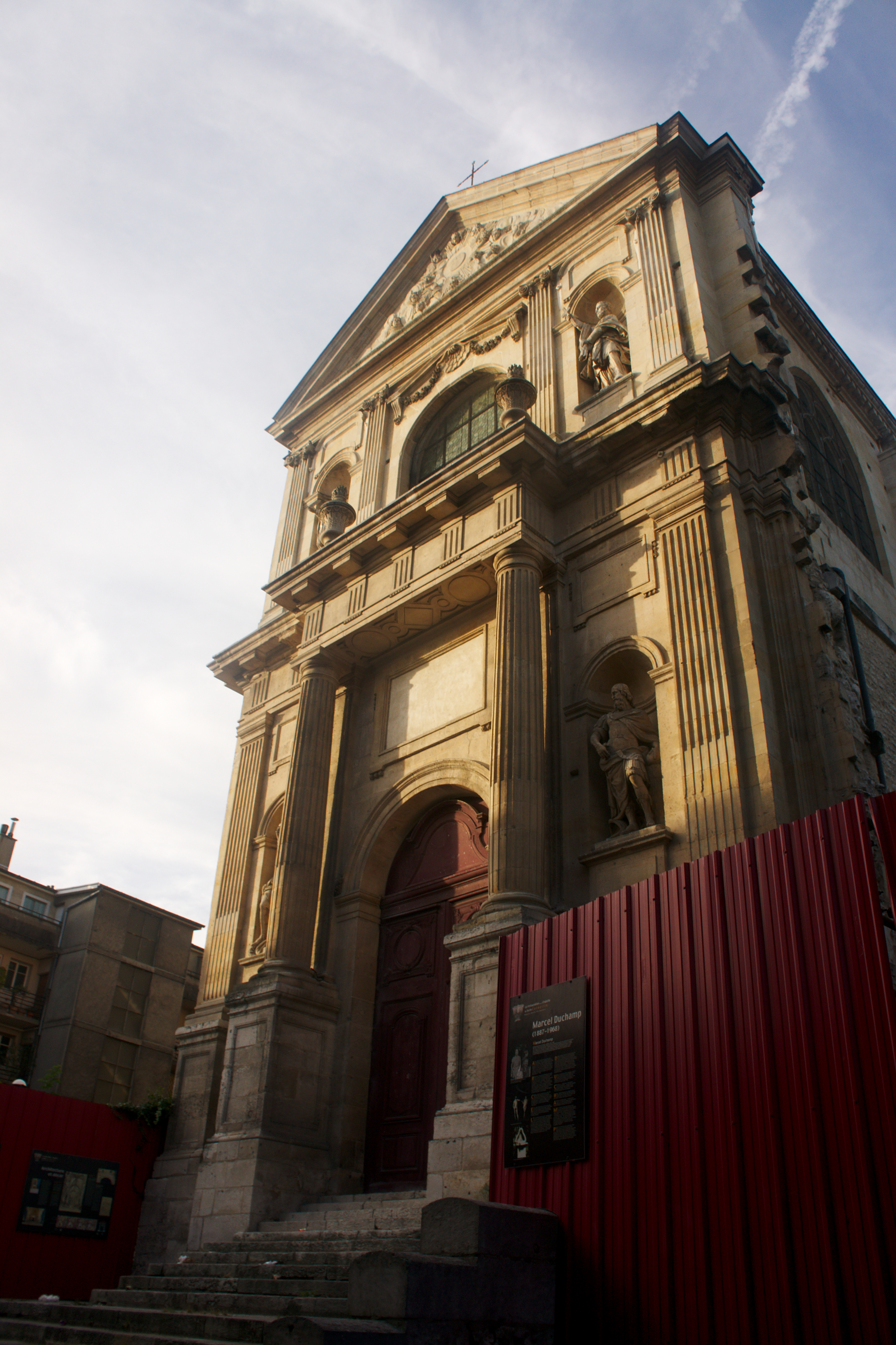 Chapelle du Lycée Corneille à Rouen.France